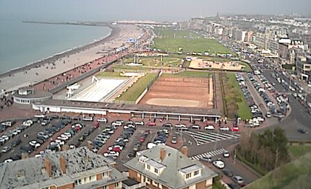 Dieppe : front de mer Photo réalisée par Michel Van Der Biest en 2002 depuis le panorama du chateau de Dieppe Status : GFDL Michel Van Der Biest 2002